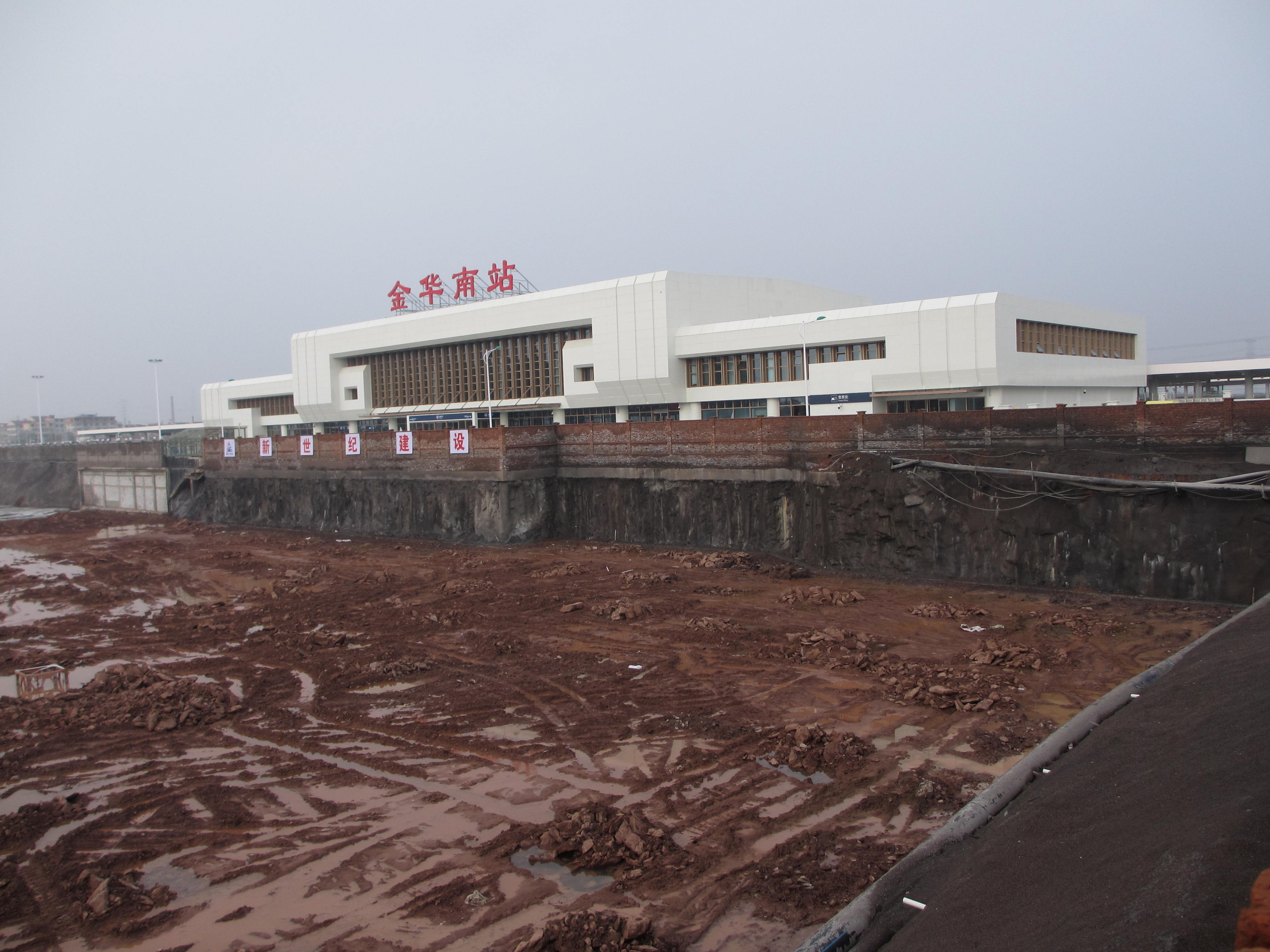 金华南站，站前广场在施工中。